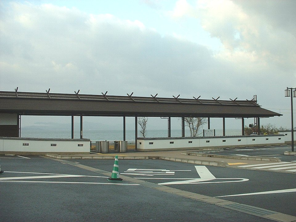 松江フォーゲルパーク駅越しにja:宍道湖を望む